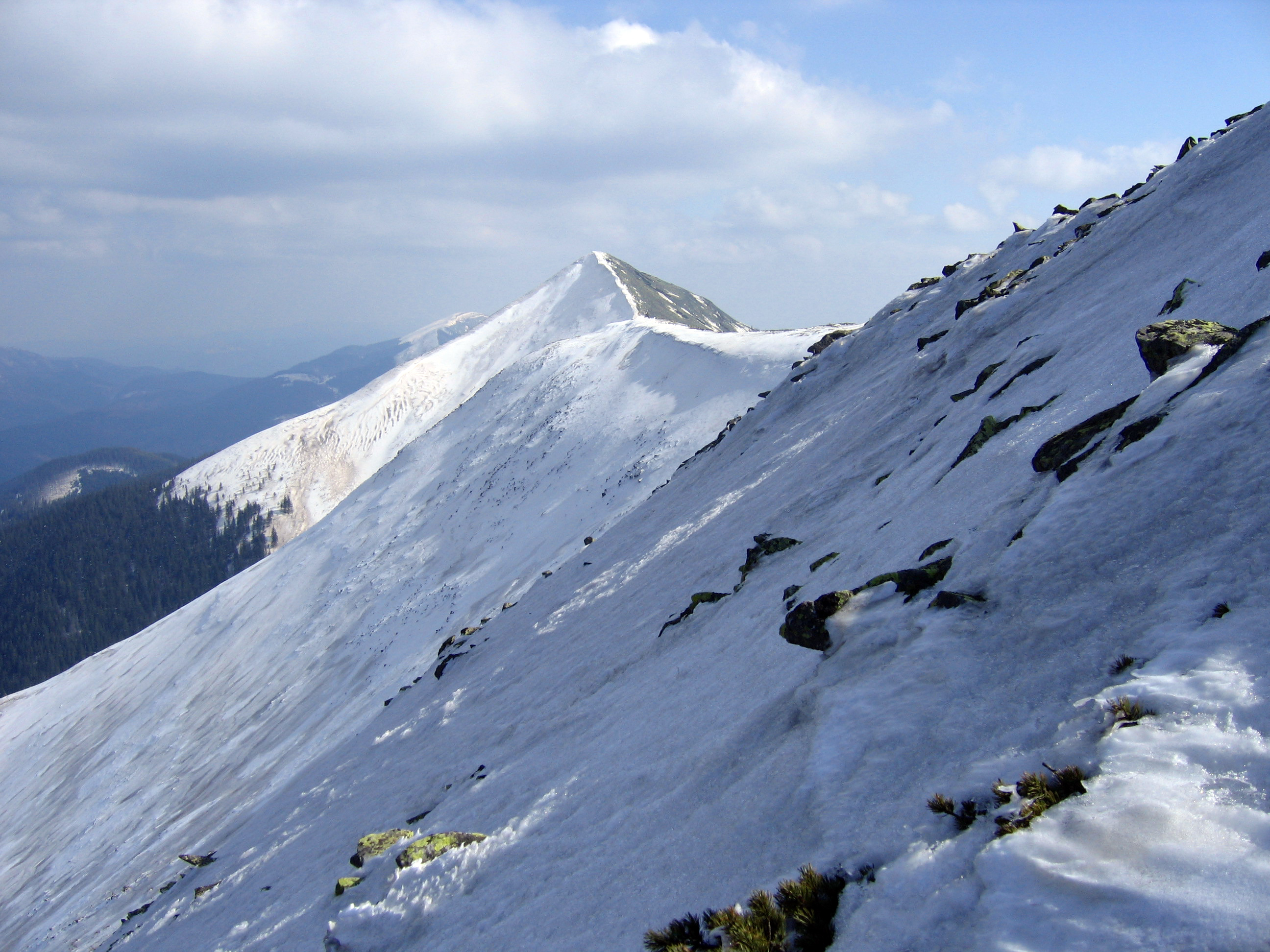 «Ґорґани», Надвірнянський район, Бистрицька та Зеленська сільські ради